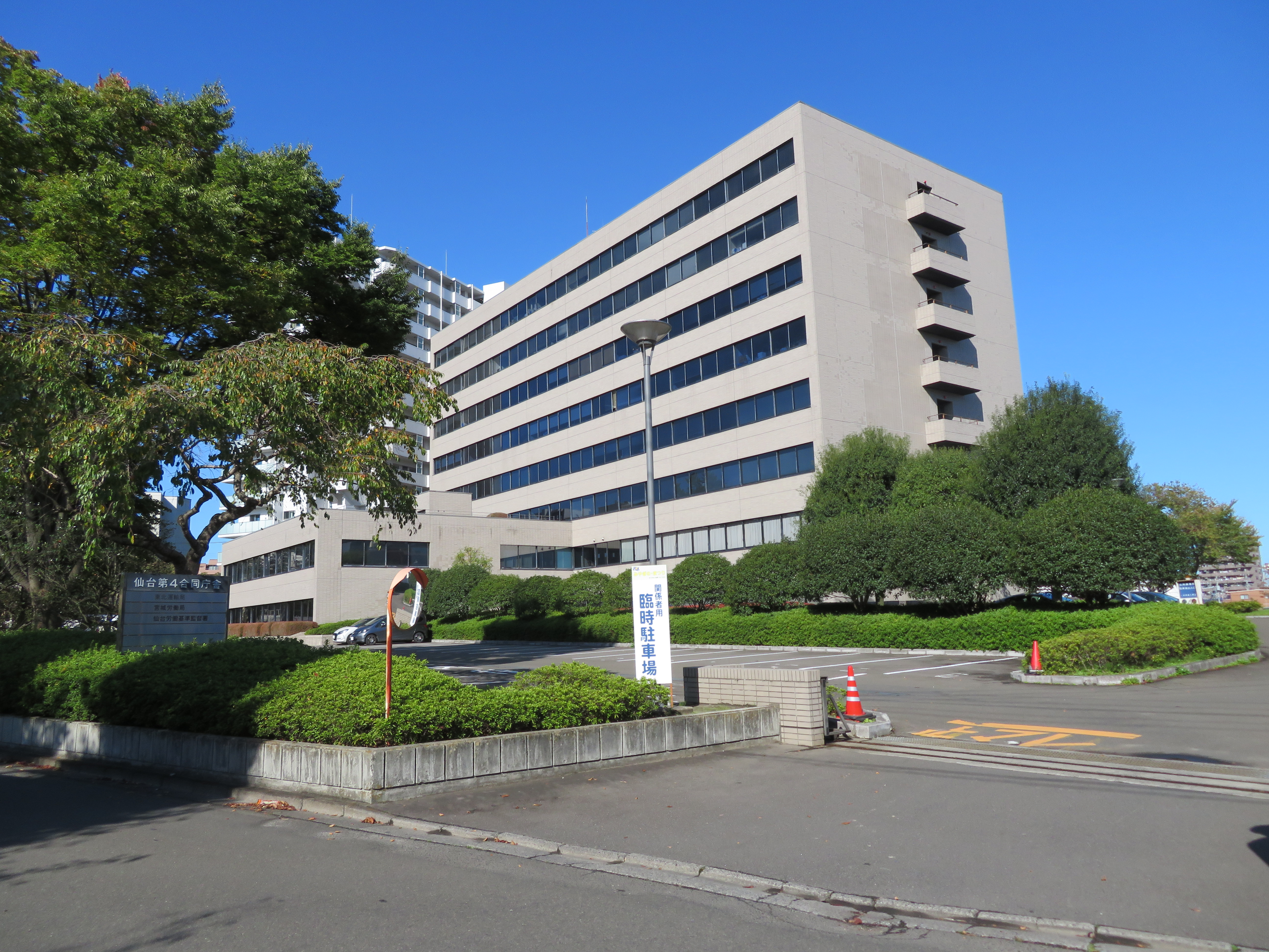 仙台市宮城野区に所在する仙台第4合同庁舎 Canon PowerShot SX720 HS